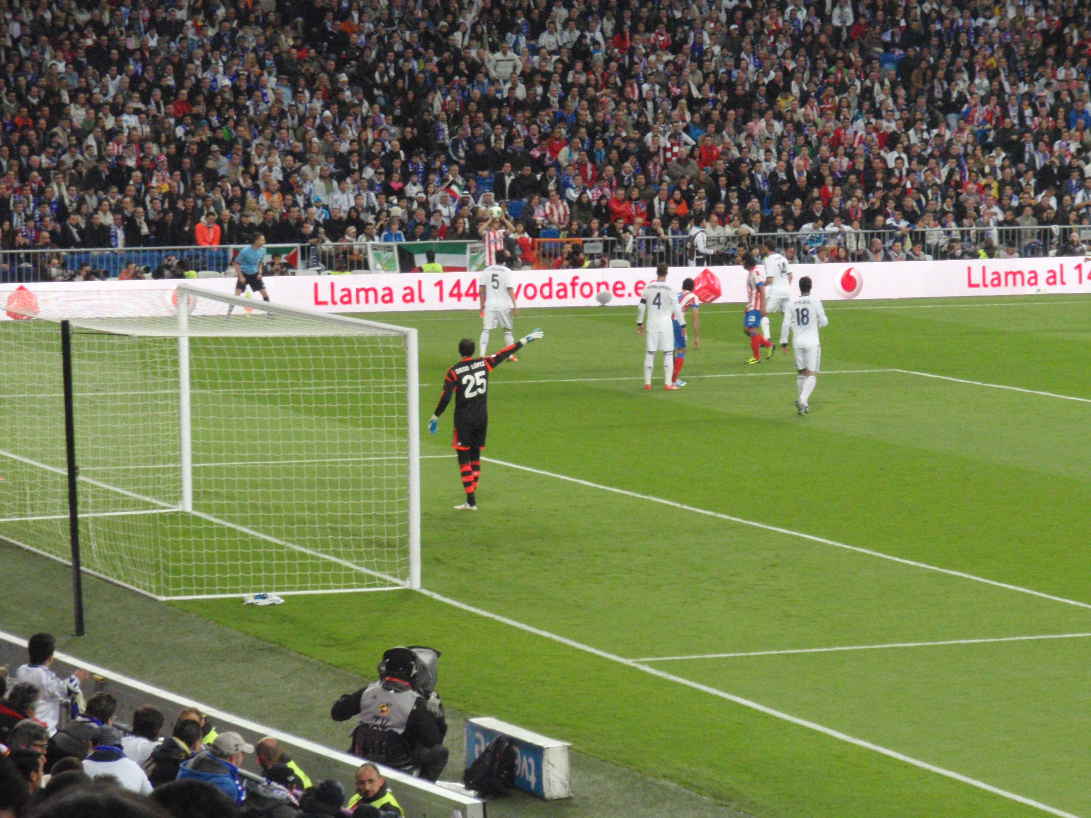 Diego López en la final de la Copa del Rey 2013.